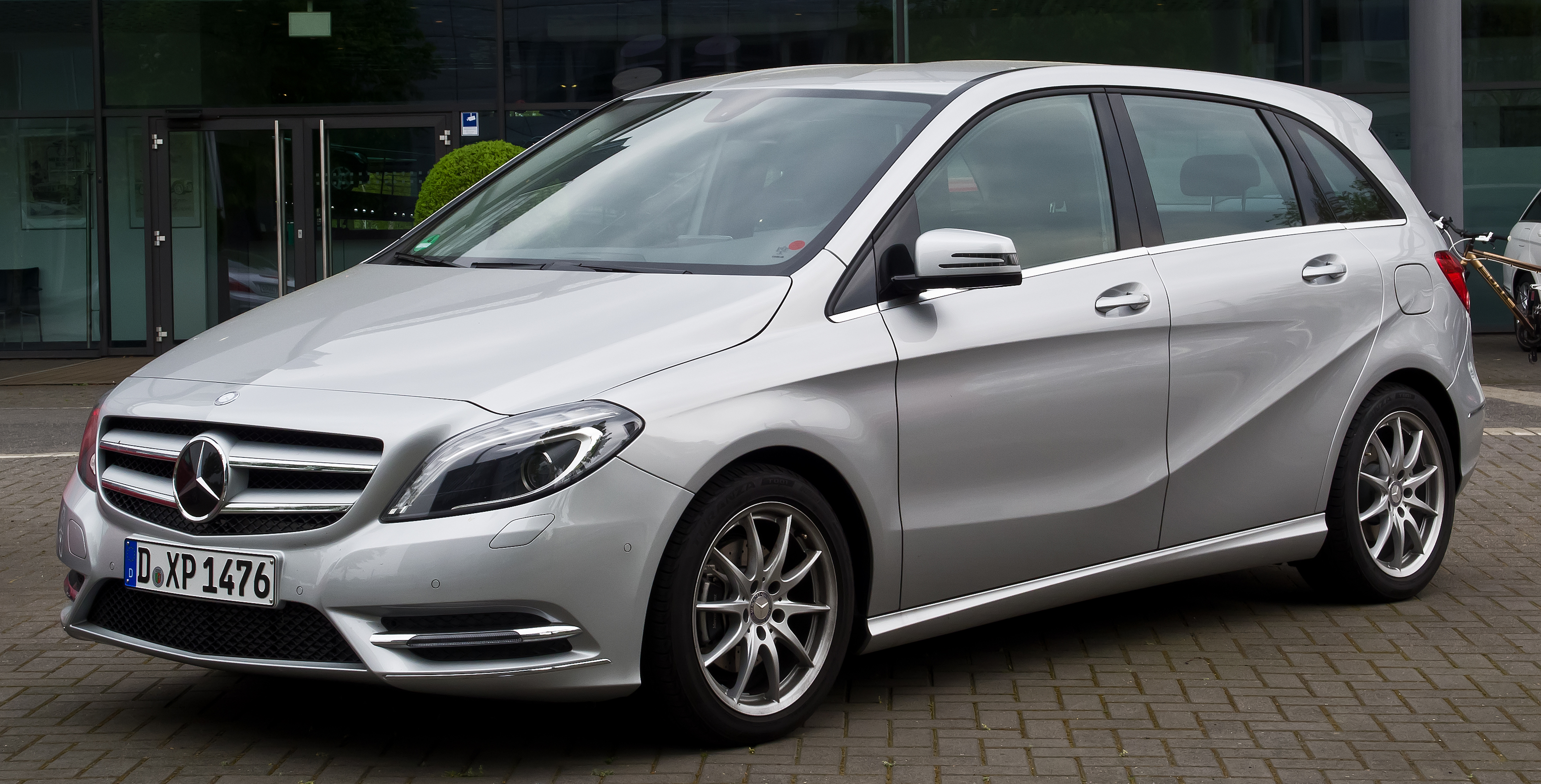 Mercedes-Benz B 200 CDI Sport-Paket (W 246)